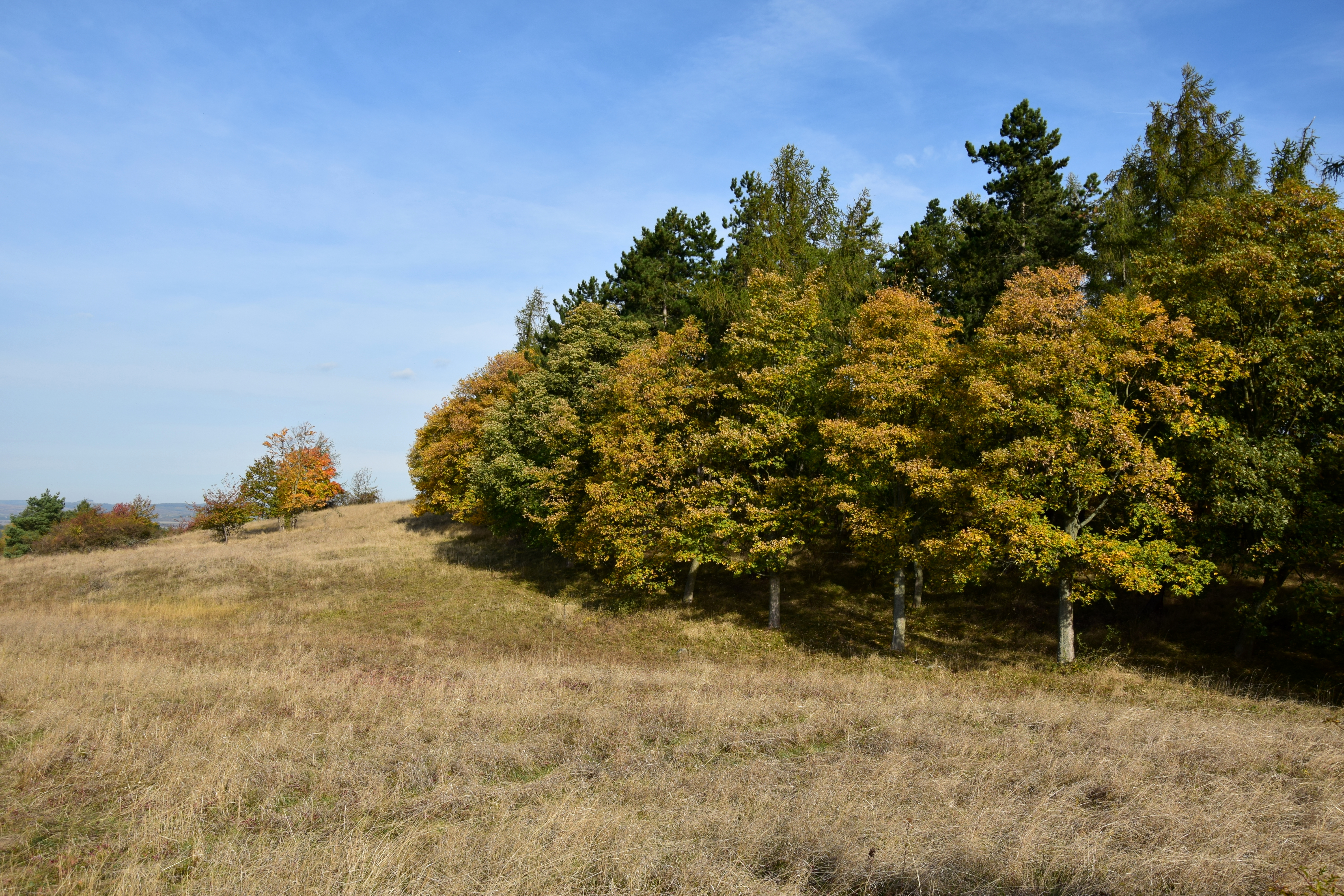 Jezerský vrch – vrcholová plošina, kde se nacházelo halštatské hradiště